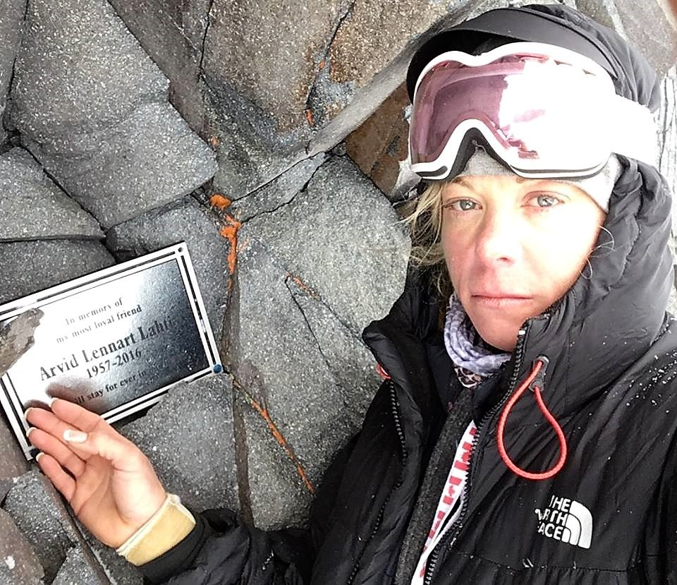 Plaque installée au mont Rainier par Monique Richard suite au décès de Arvid Lahti en 2016